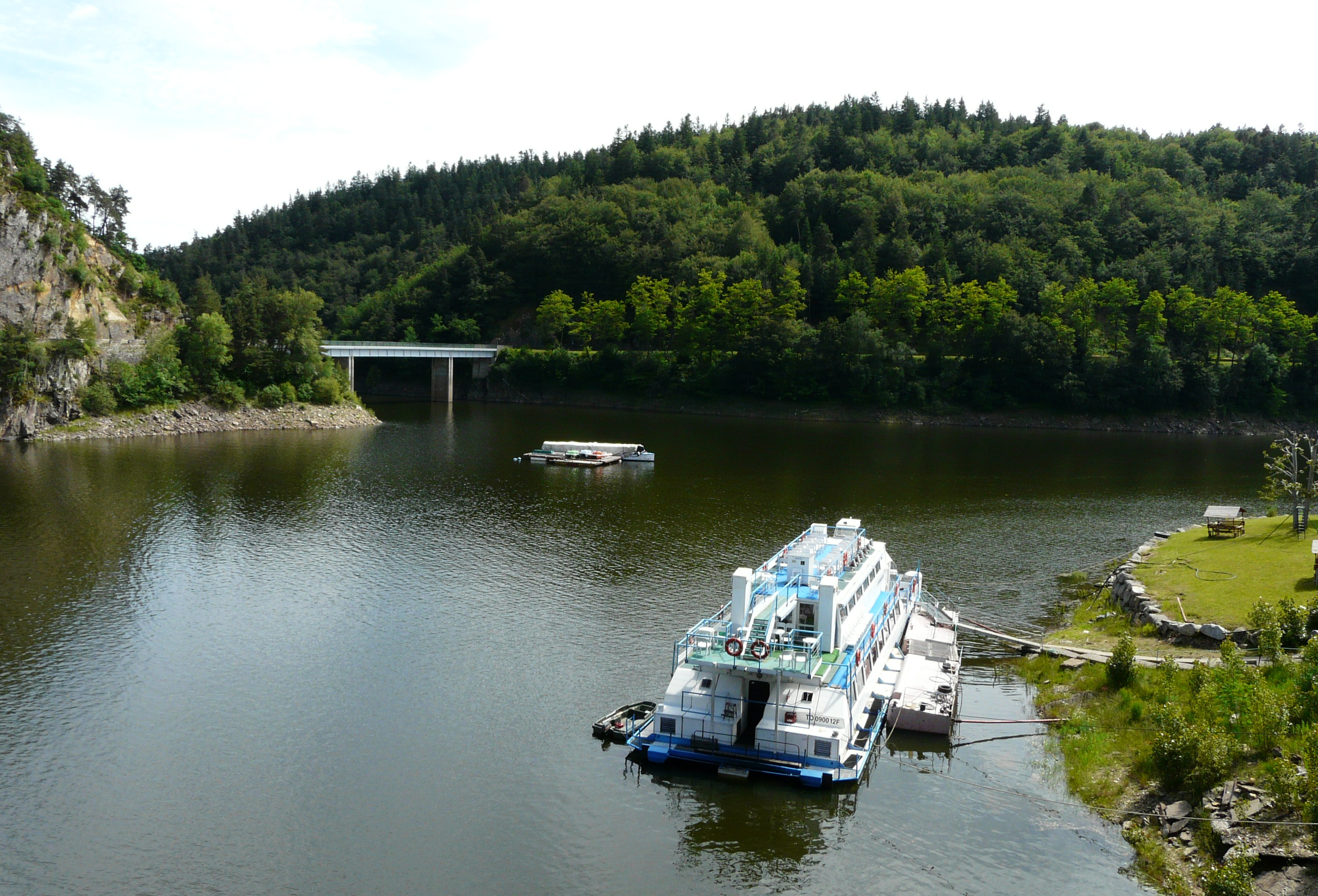 La Truyère dans le lac de retenue du barrage de Grandval, en aval du pont de la route départementale 909, Cantal, France. Au fond, sous le pont, débouche le ruisseau d'Arcomie.